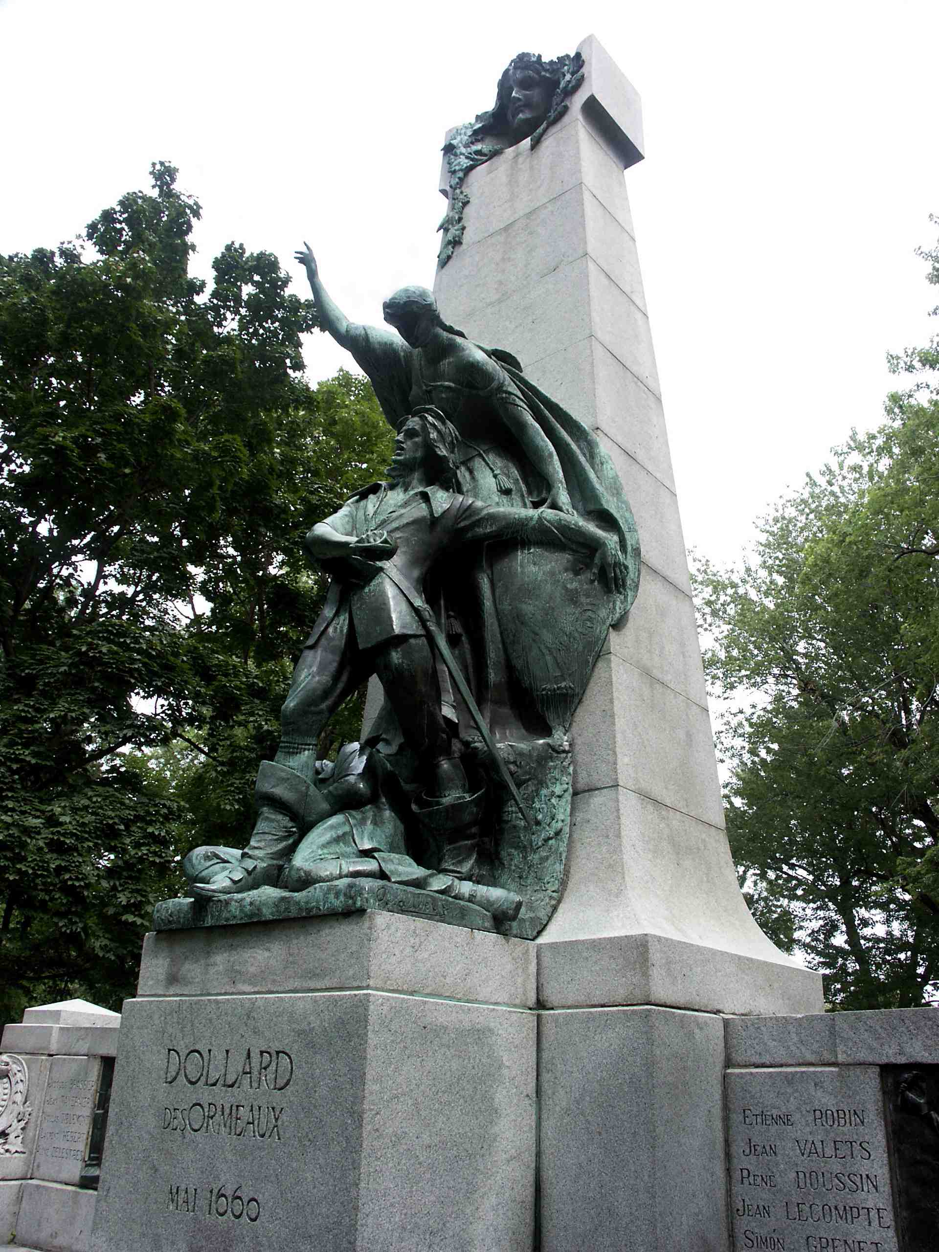 La statue de Dollard des Ormeaux au parc Lafontaine à Montréal, août 2005. Photo par User:Gene.arboit.